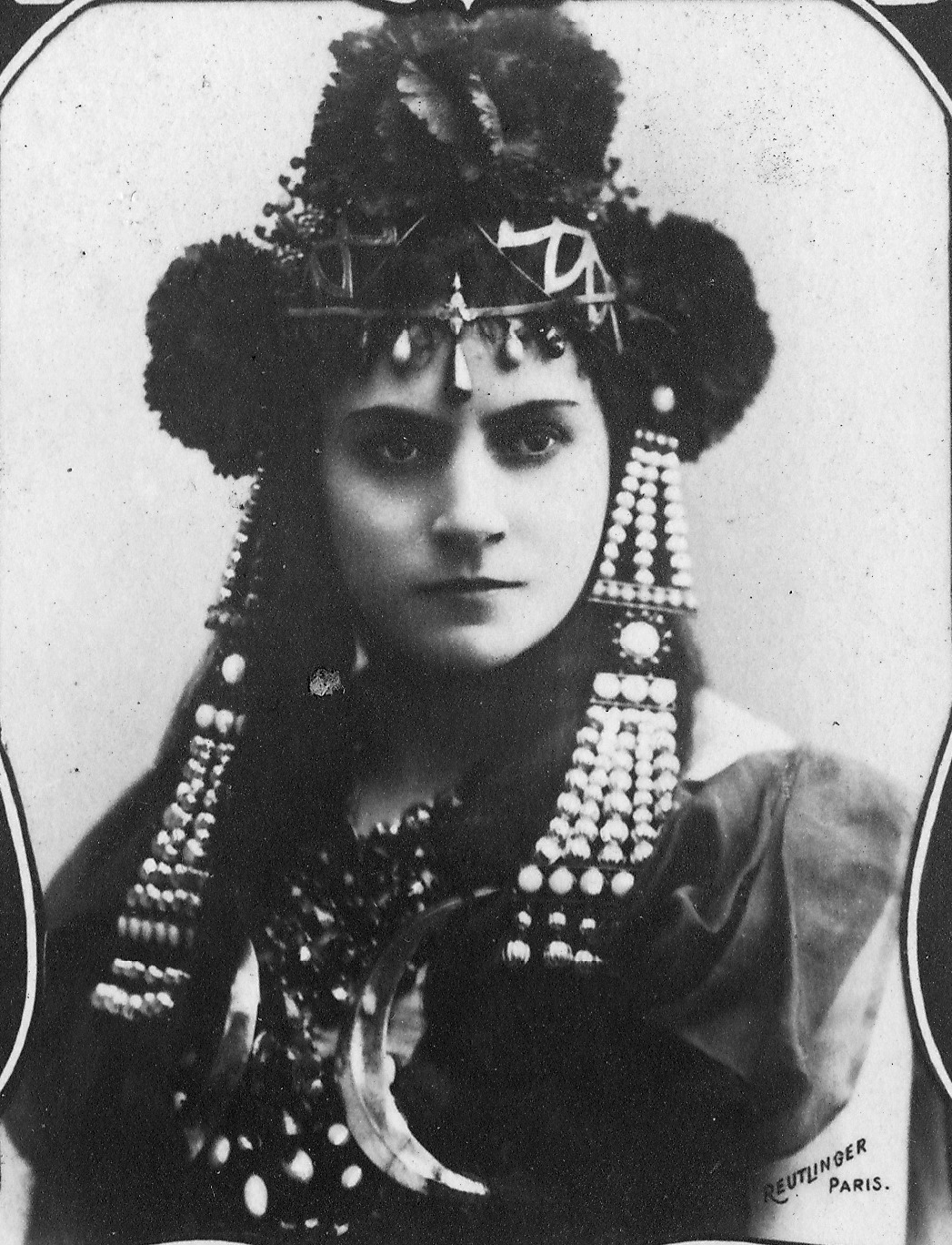 Rose Caron